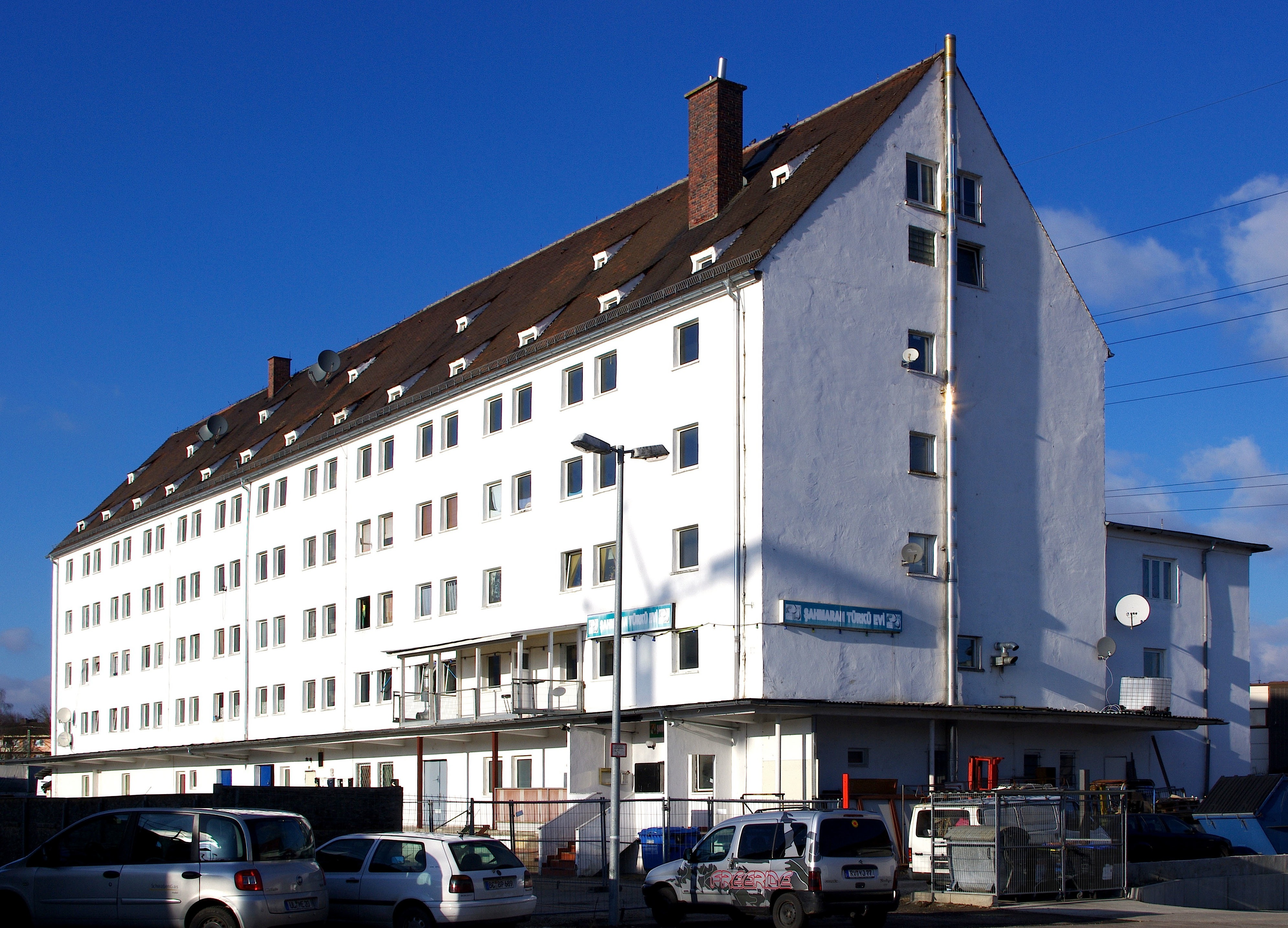 Letzter verbliebener Speicher des in den 1930ern als Nachfolger des Bayerischen Nebenartilleridepots erbauten Heereszeugamts in Neu-Ulm.